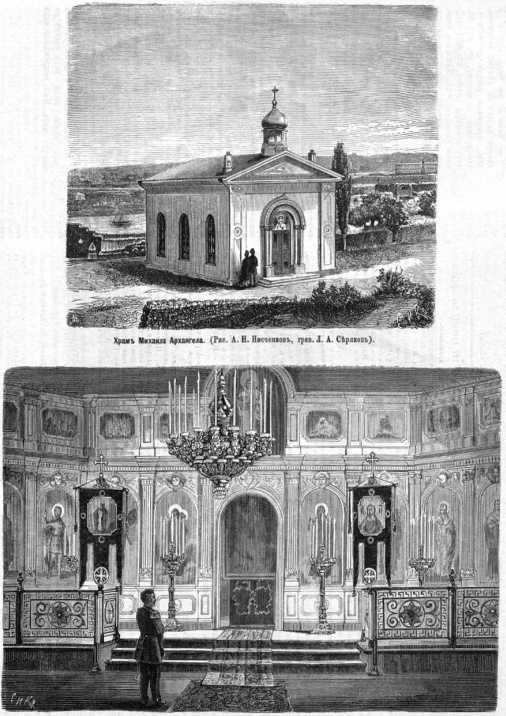 Св. Михаїла Архістратига церква, 1848, арх. Фандервейде, класицистичні форми, романська стилістика фасаду. З 1889 – полкова церква 50-го Білостоцького полку, з 1917 – гарнізонна церква Севастопольської фортеці, рест. 1971: Меморіальні дошки (24) з назвами частин, які брали участь в обороні Севастополя 1854–1855, Севастополь, вул. Леніна, 9